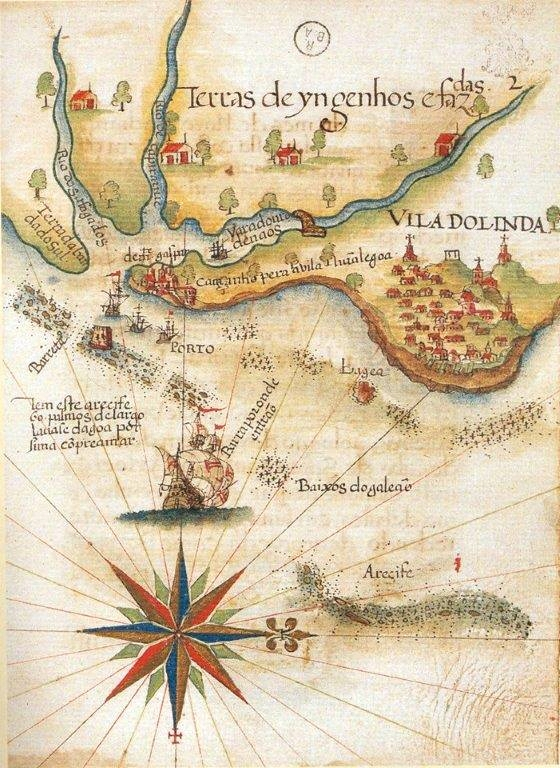 Mapa de Luís Teixeira (c. 1582-1585) com a Vila de Olinda e o Porto do Recife, Brasil Colônia.